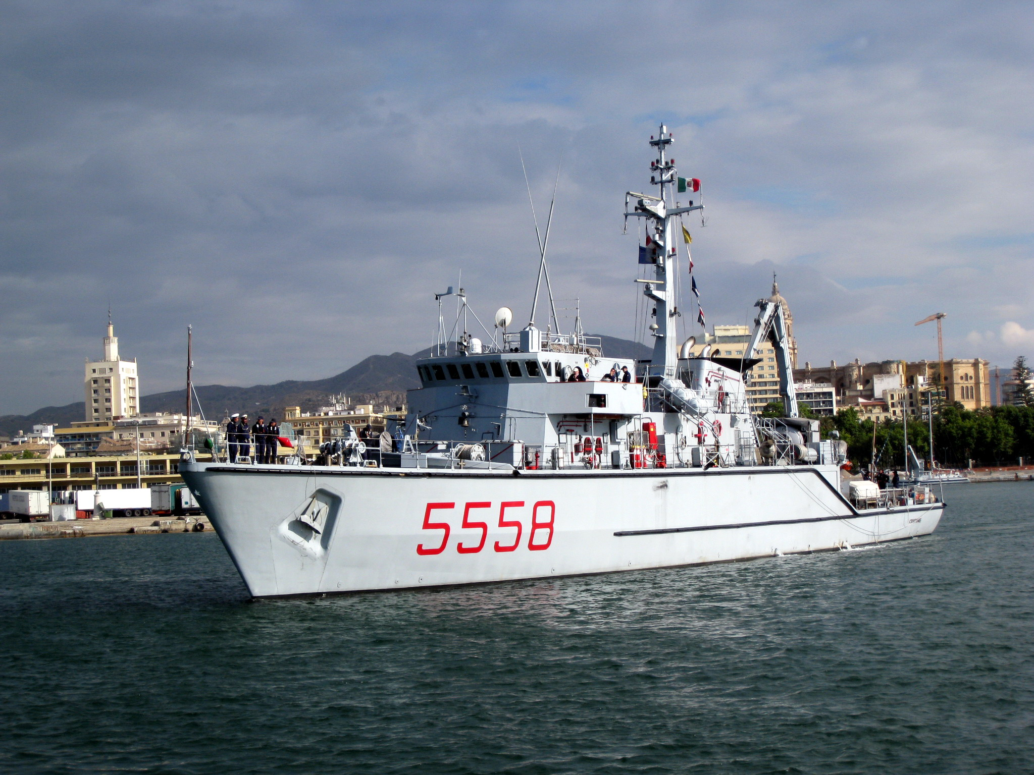 Il cacciamine Crotone nel porto spagnolo di Malaga